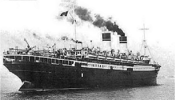 Il transatlantico Roma visto di poppa in allontanamento verso l'imboccatura del porto, in una foto della Società Italia di Navigazione